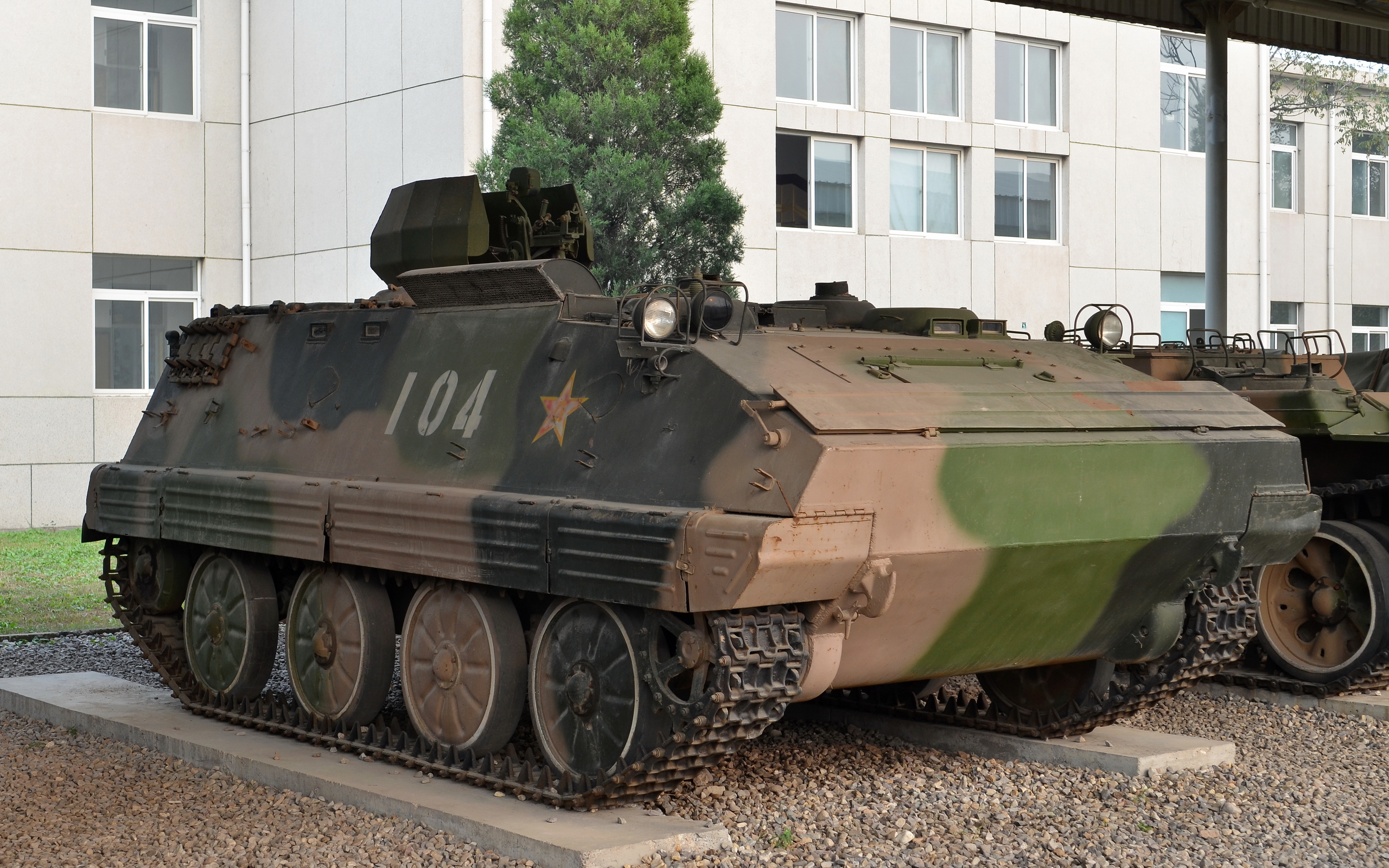 63-2式 (WZ531) 装甲输送车